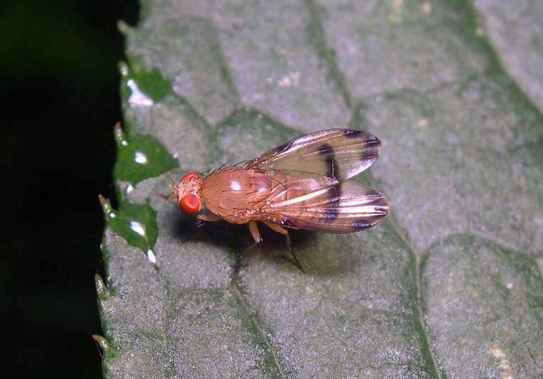 Homoneura hirayamae (Matsumura, 1916),Yokohama, Kanagawa Prefecture, Honshu, Japan. ヒラヤマシマバエ 神奈川県横浜市内